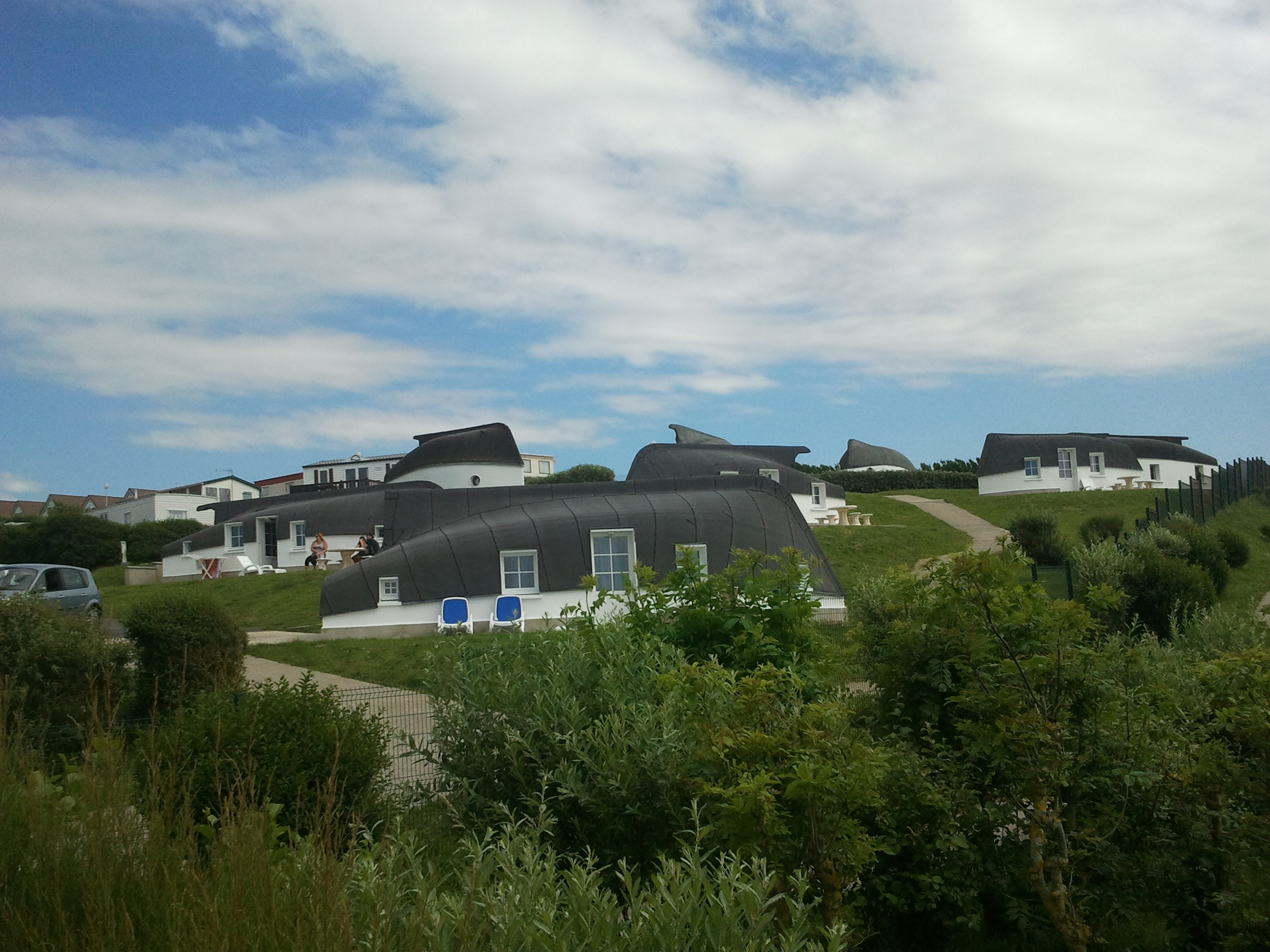 Quilles en l'air à Équihen-Plage (Pas-de-Calais, France)